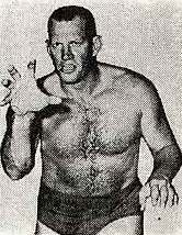 Fritz Von Erich sur un programme de catch du 28 juin 1976